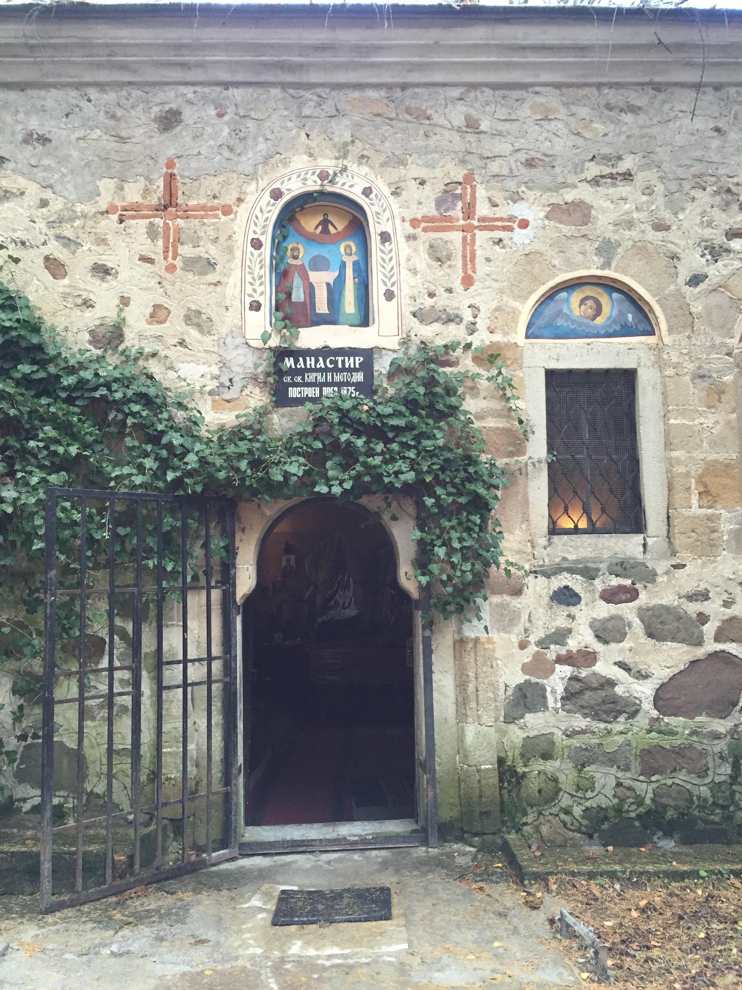 Горнобански манастир